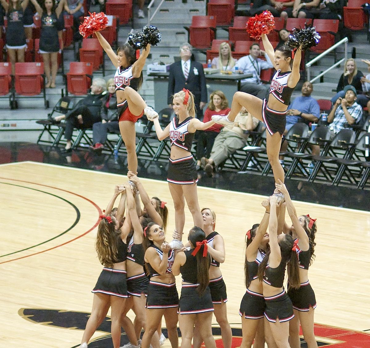 Aztec Cheerleaders